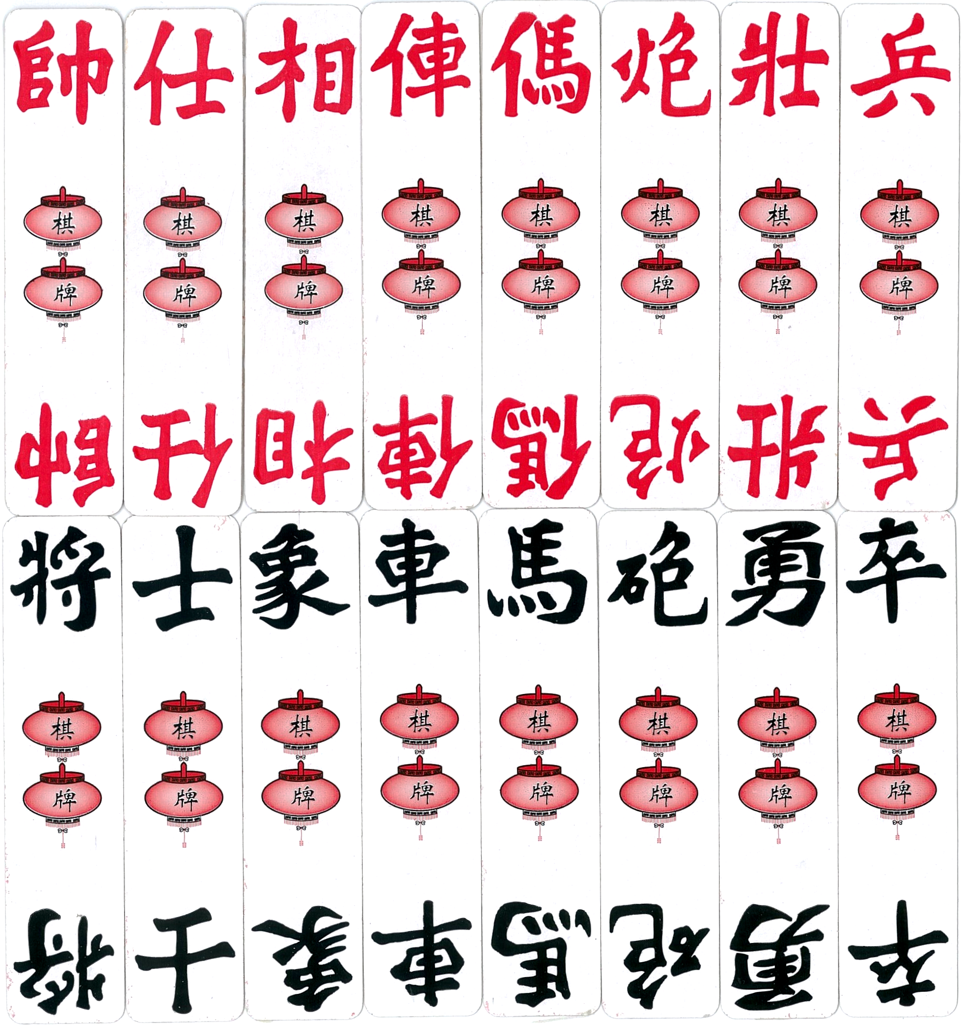 中文（台灣）: 四川雙色象棋牌